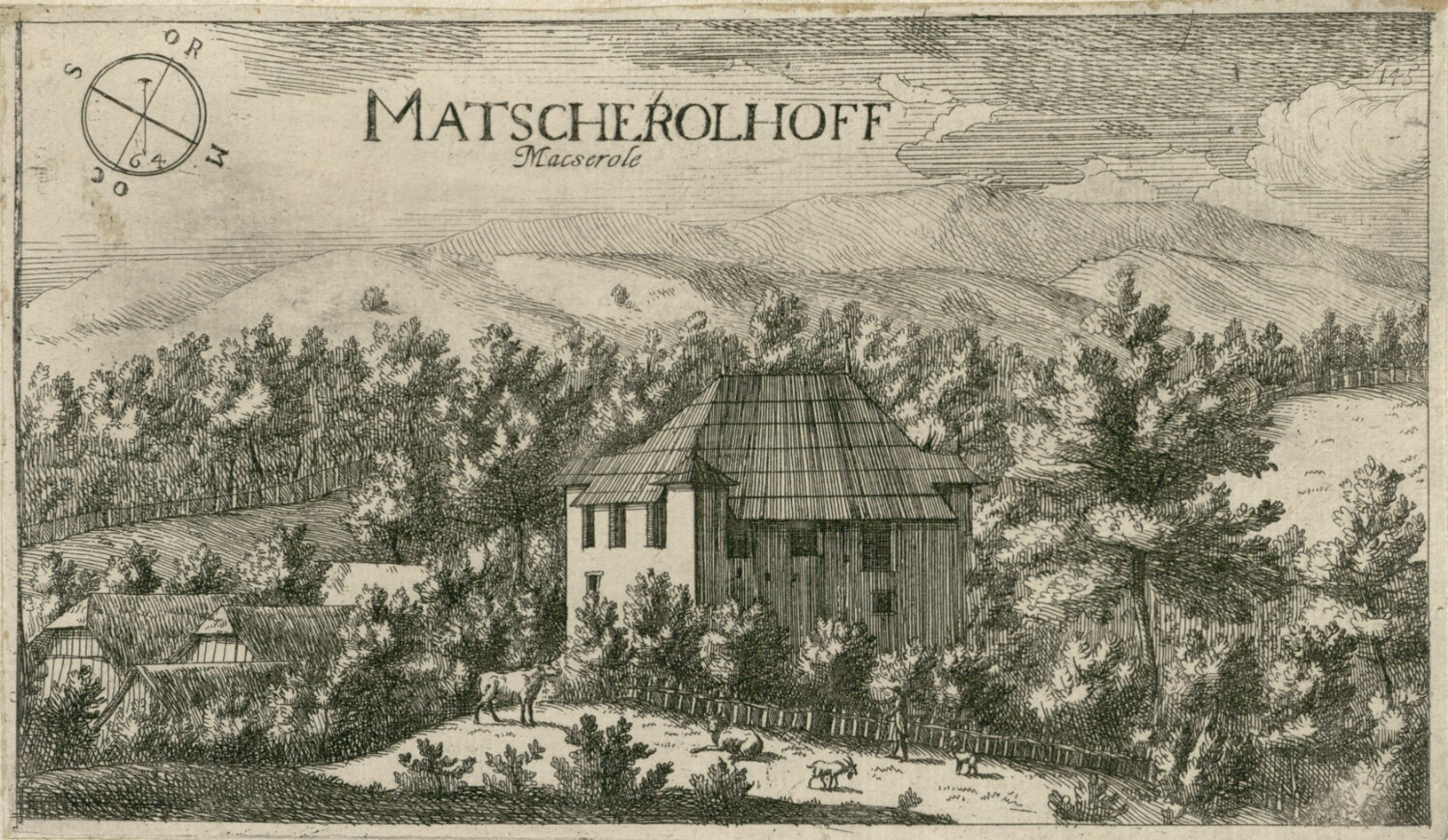 Dvorec Mačerole